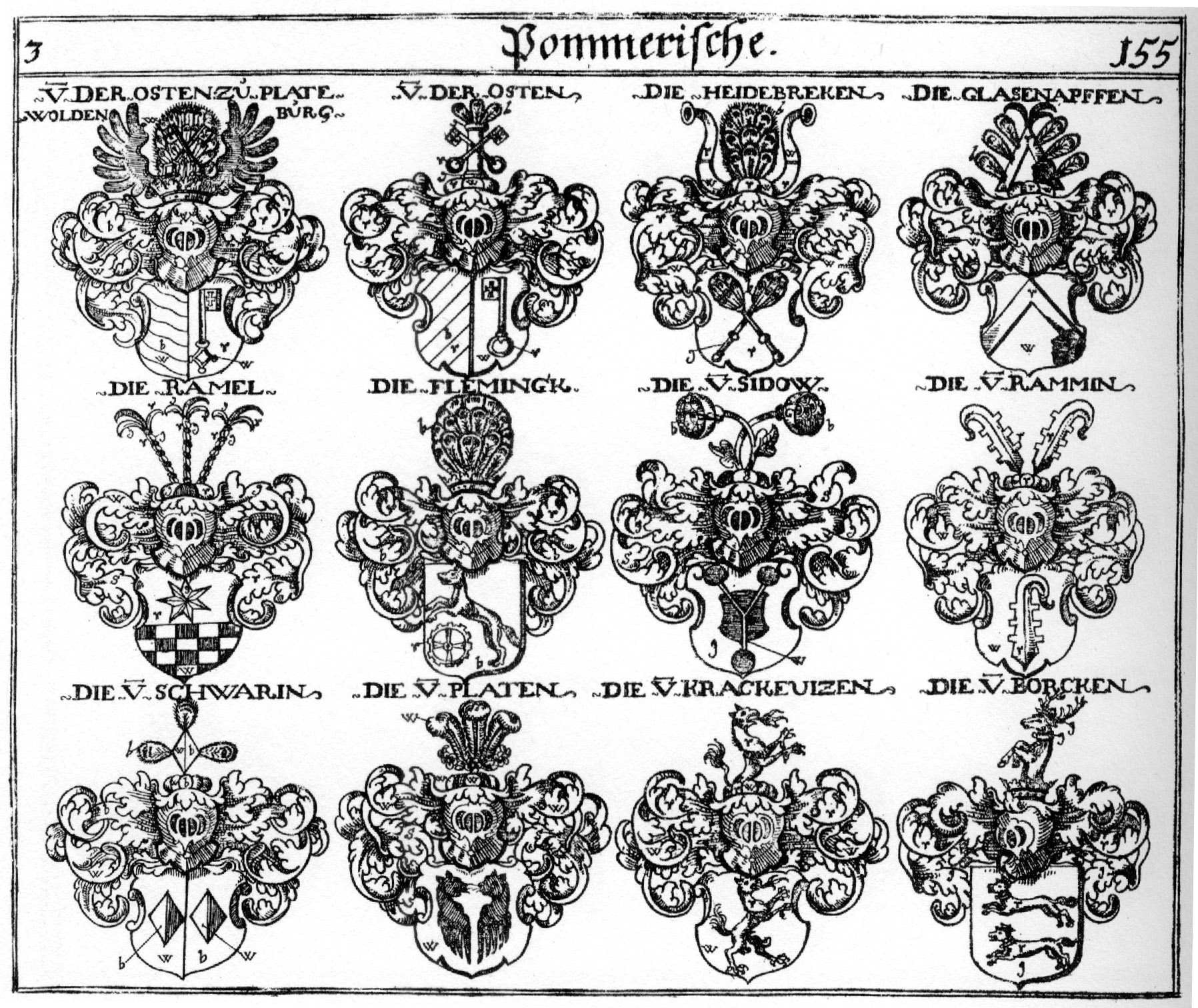 Siebmachers Wappenbuch, Tafeln der 9. Ausgabe 1701 und der 10. Ausgabe 1705, nach dem Faksimile von 1975. Tafel aus Teil 3.